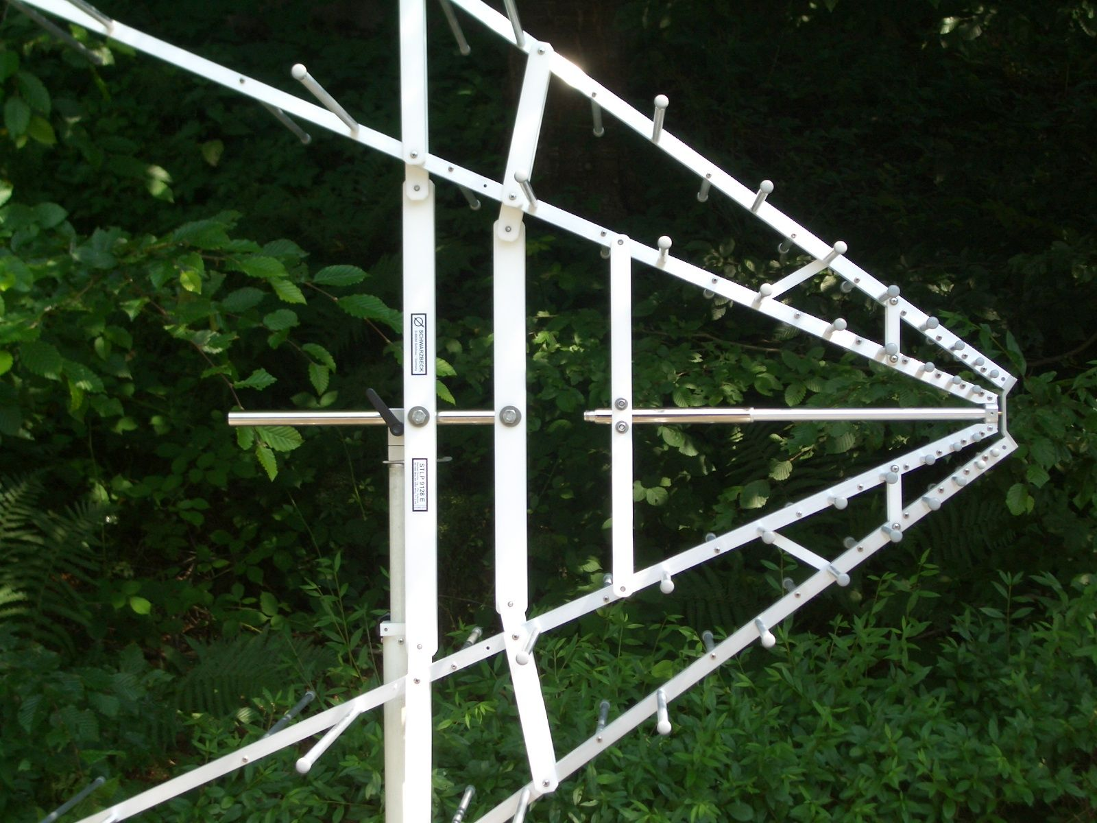 Stacked double Log.-Per. Antenna, 65 - 4000 MHz